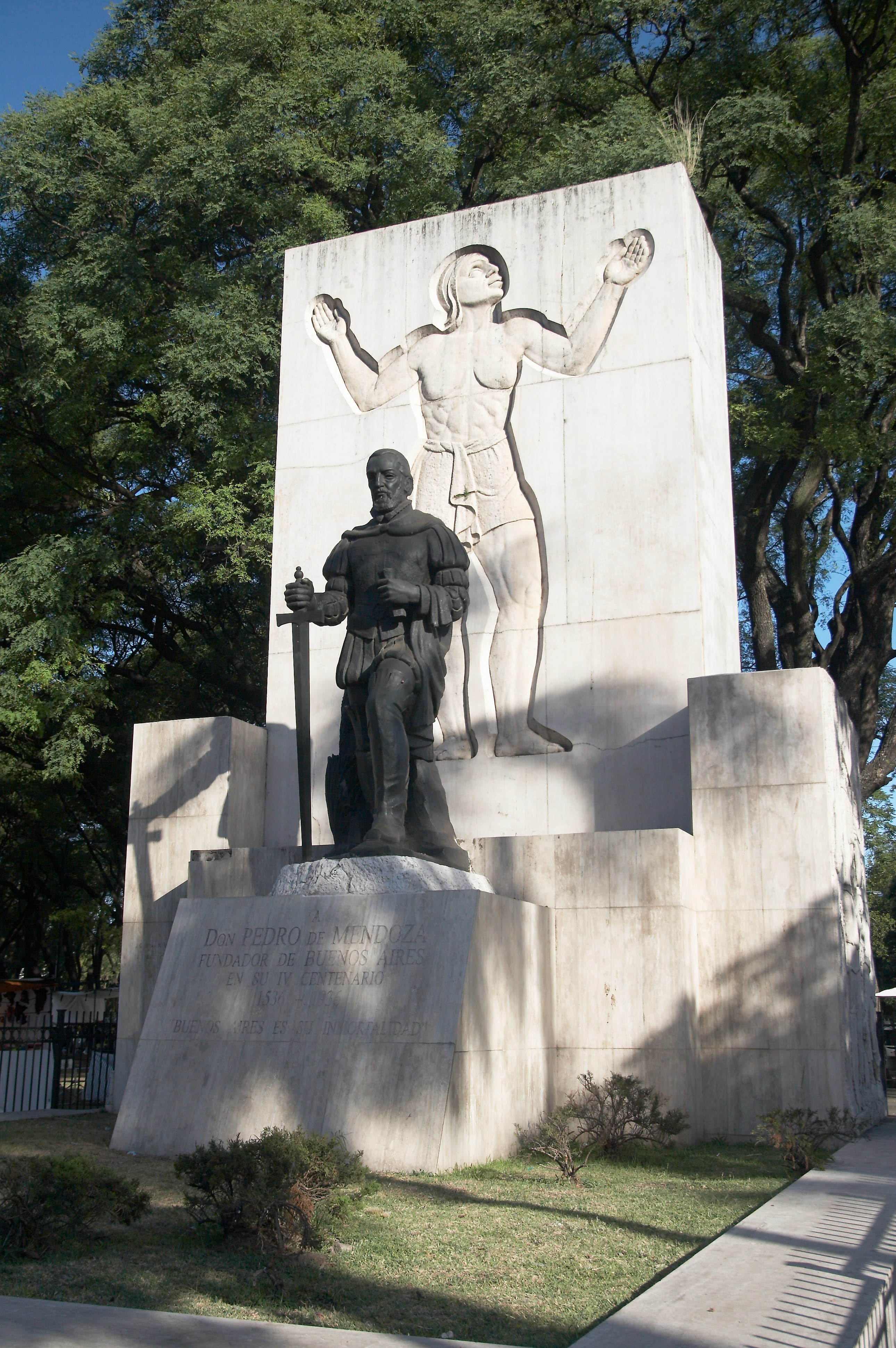 Monumento a Pedro de Mendoza, Parque Lezama, barrio de San Telmo, Buenos Aires, Argentina.